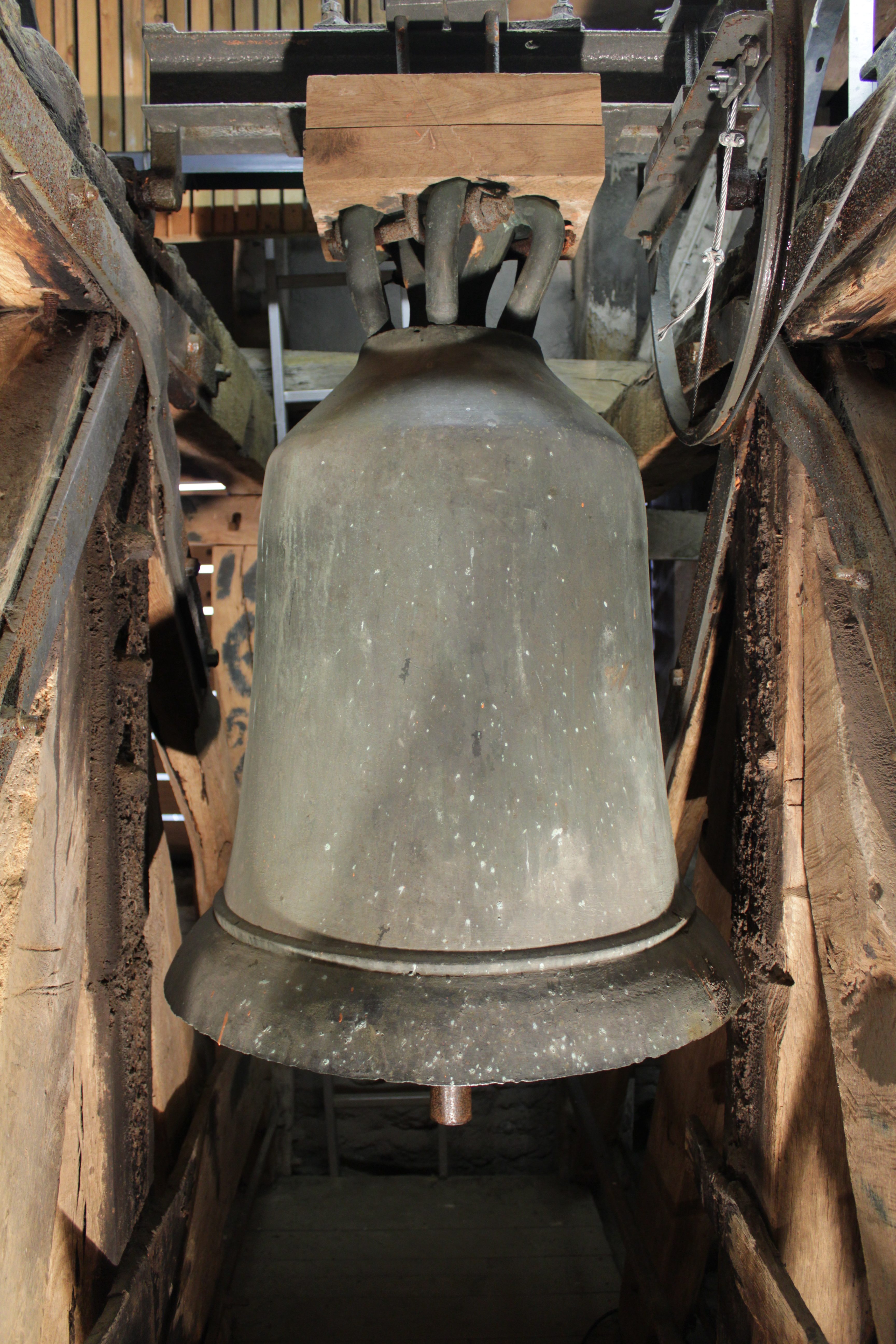 Die Vaterunserglocke der evangelischen Kirche in Müllenbach wurde um das Jahr 1050 herum gegossen und ist die älteste Glocke im Oberbergischen Kreis.